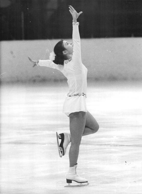 Christine Errath ADN-ZB Mittelstädt 15.11.72 Berlin: Vorschaumotiv zu den internationalen Eiskunstlauf-Wettbewerben um den Pokal der Blauen Schwerter vom 16.-18.11.1972 in Dresden. Bei den Damen tritt die Berlinerin Christine Errath (SC Dynamo) als Pokalverteidigerin und Favoritin an. Abgebildete Personen: Errath, Christine: Eiskunstläuferin, DDR